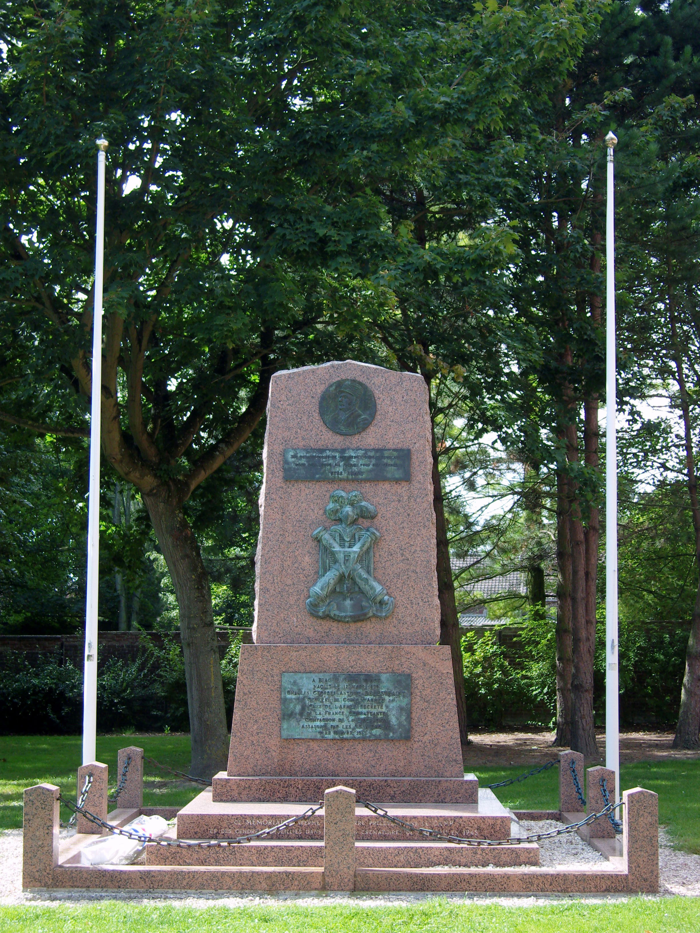 Biache-Saint-Vaast Stéle en hommage au Général Delestraint.